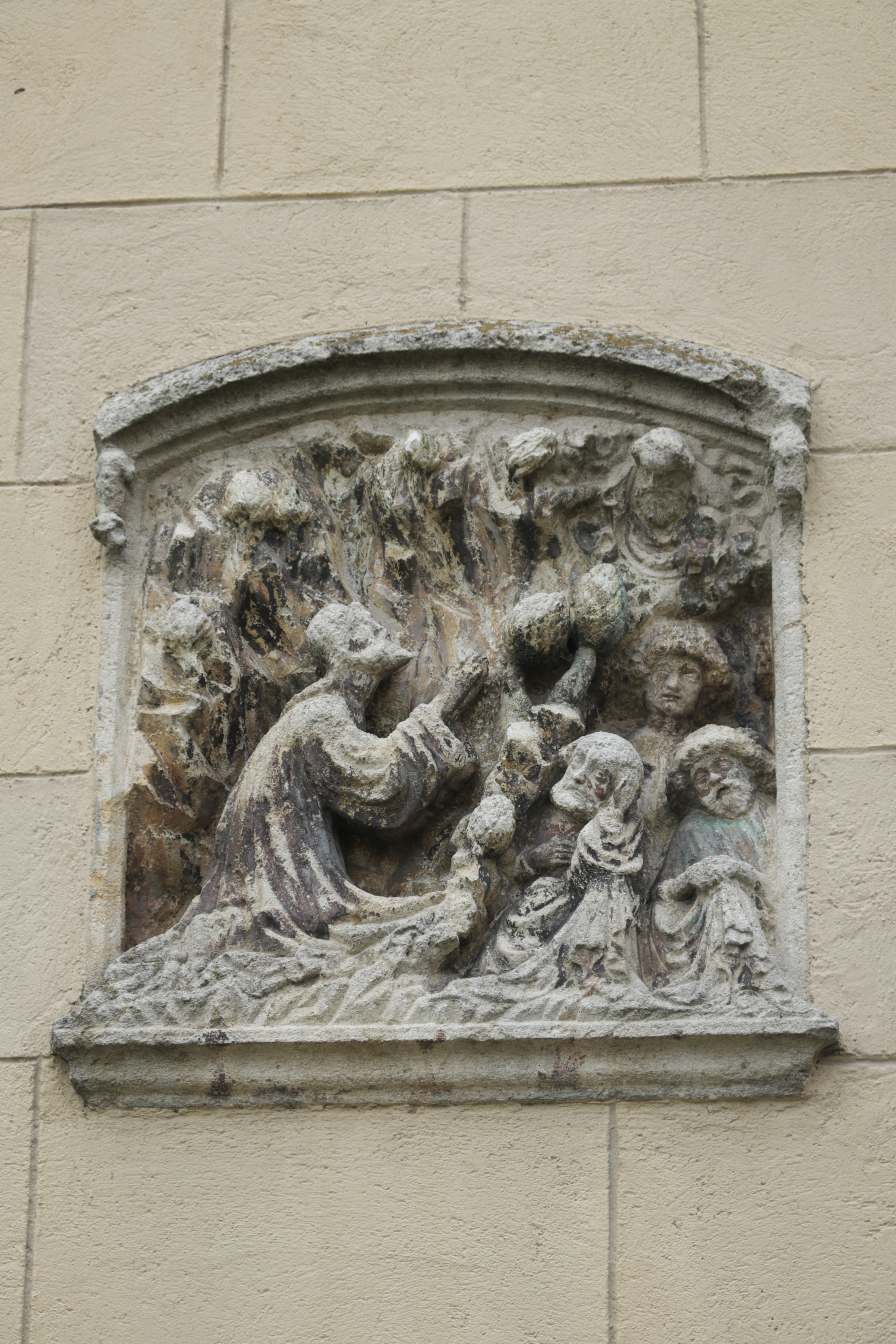 Katholische Pfarrkirche St. Leonhard in Pförring im oberbayerischen Landkreis Eichstätt (Bayern/Deutschland), Ölbergrelief aus der Mitte des 15. Jahrhunderts